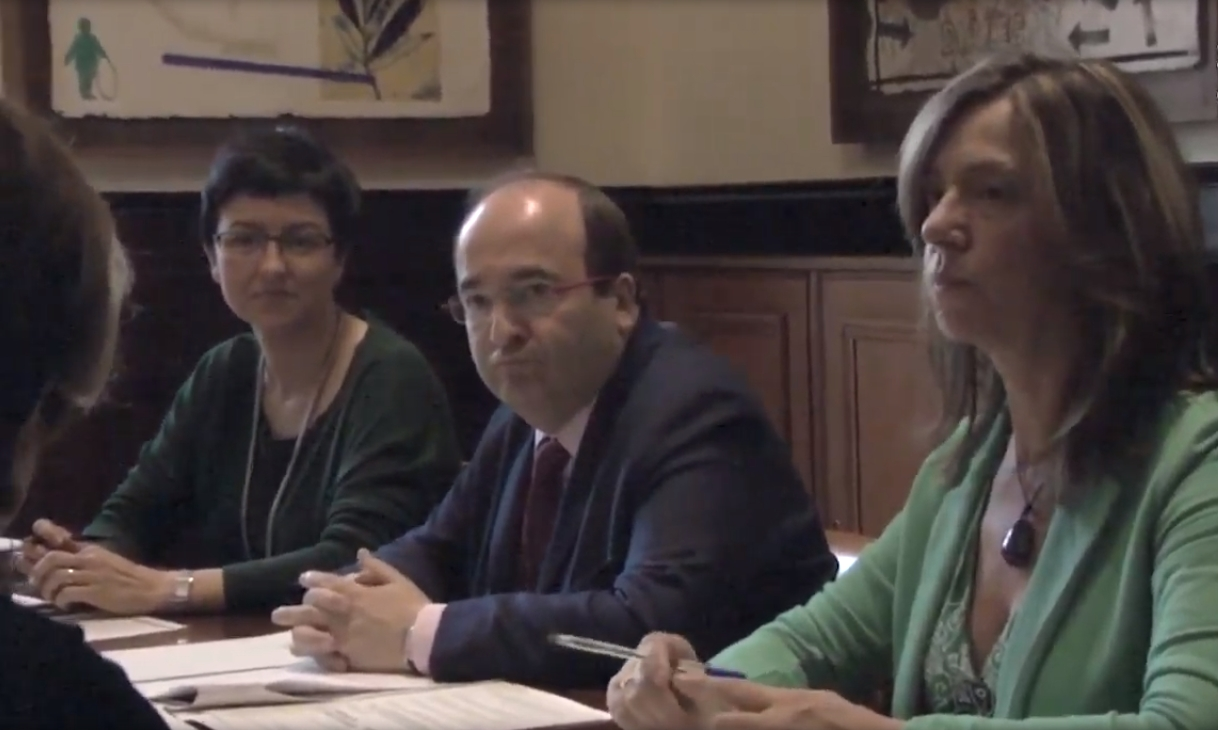 La UGT de Catalunya ha presentat aquest matí al PSC, en el Parlament de Catalunya, la proposta: 'Garantia +55' i que consisteix en rescatar a les persones aturades majors de 55 anys.